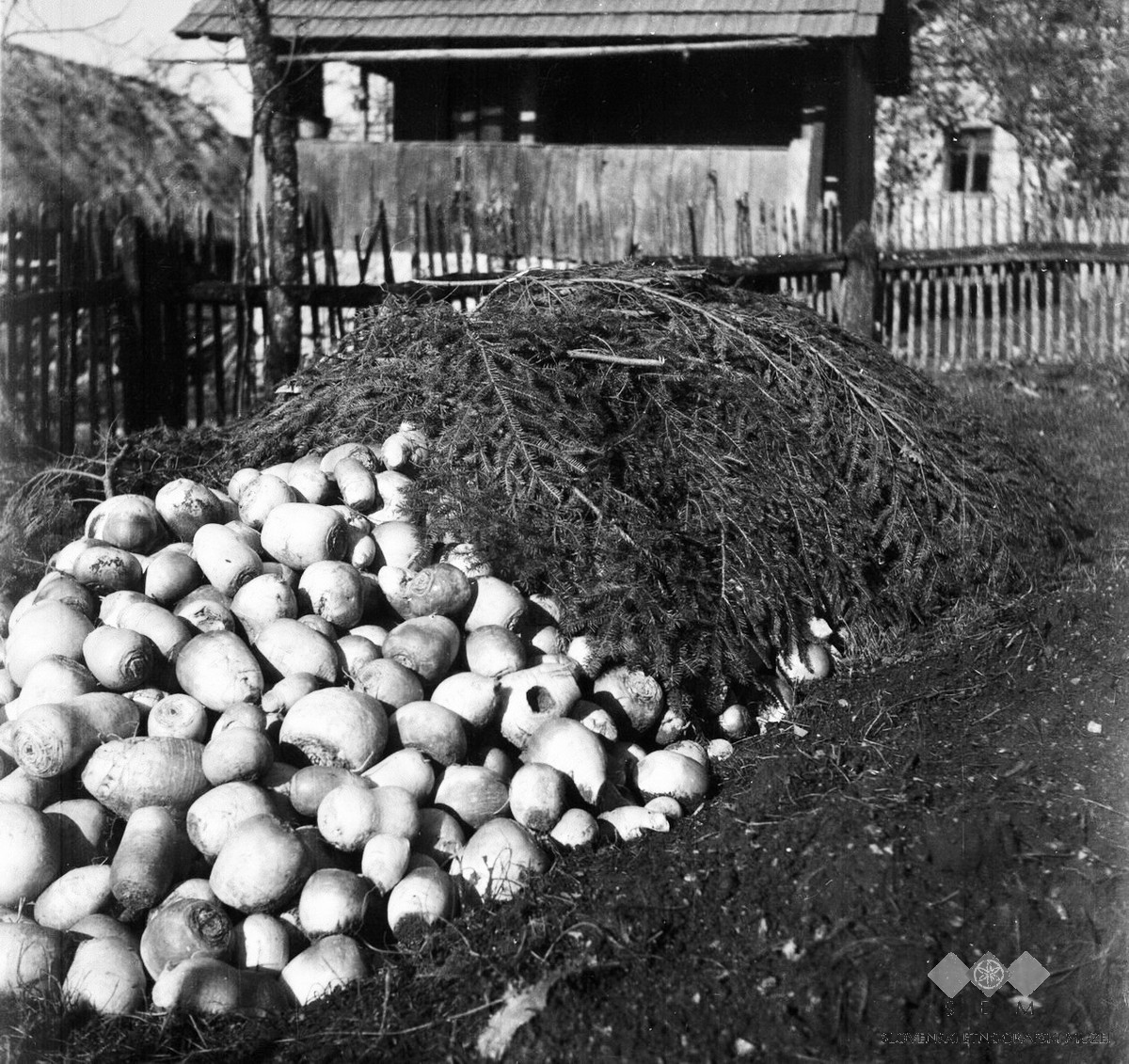 V vrtu pred hišo spravljena repa v jami, napol že prekrita s smrečjem, Male Lipljene.